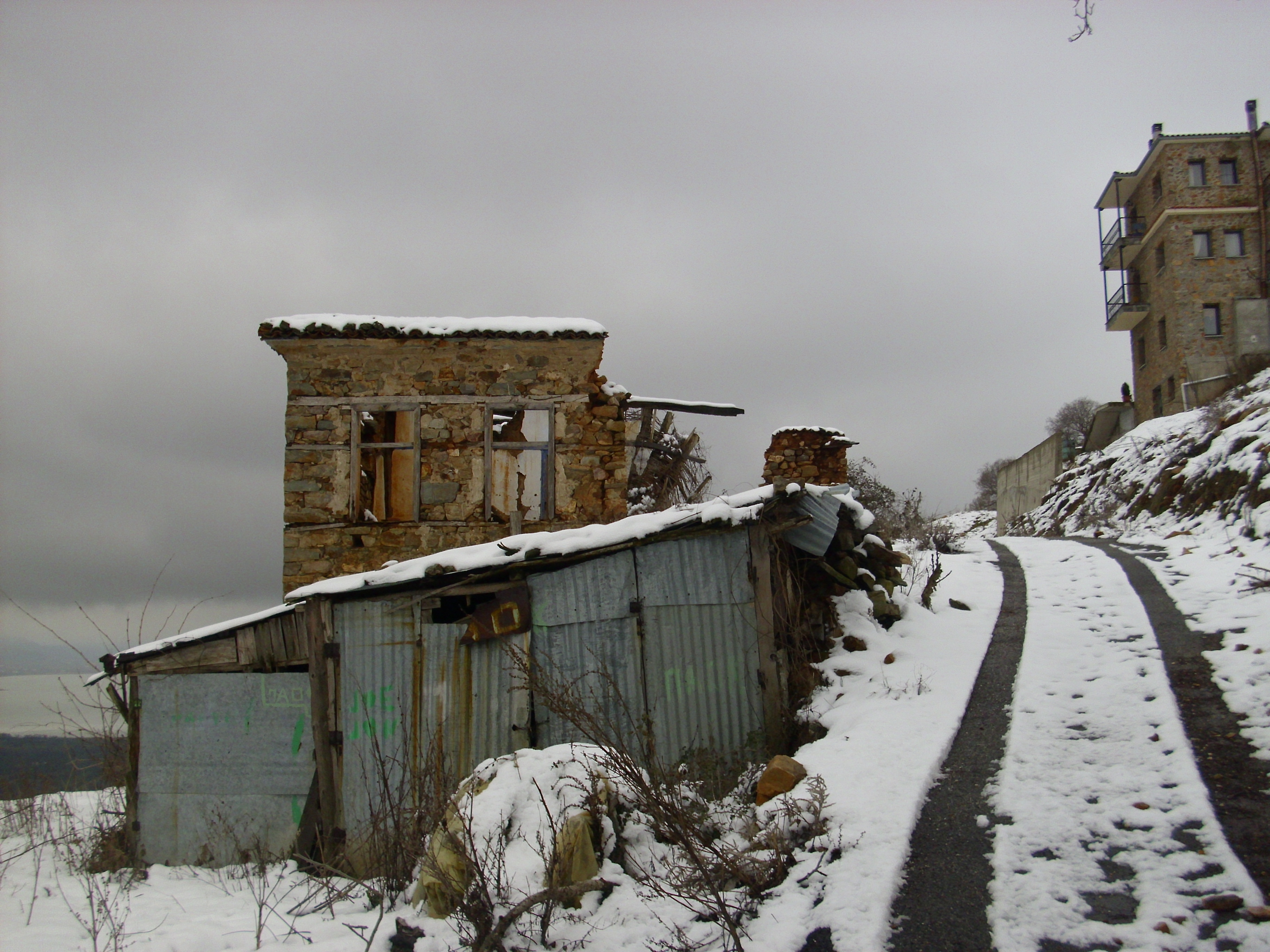 Къщата на Любка Рондова в родното й село Шестово, днес Република Гърция.